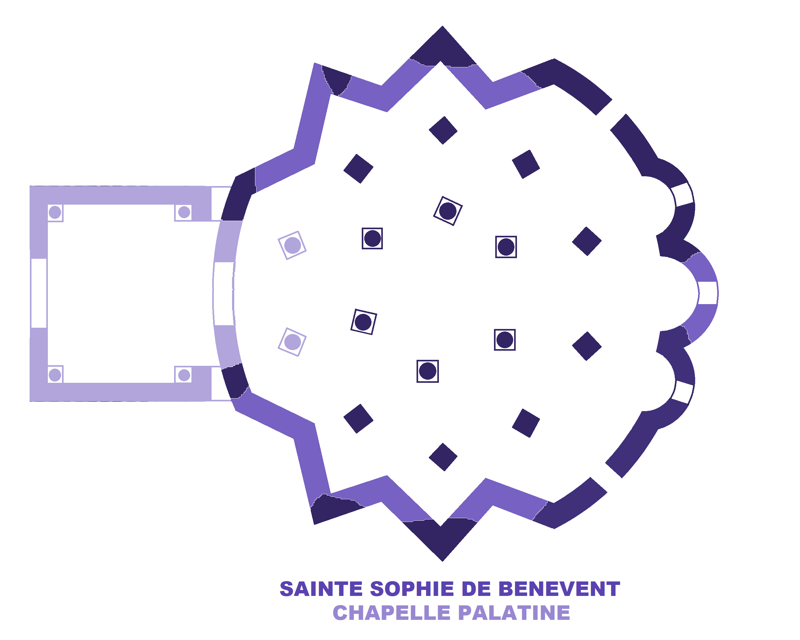 Chapelle palatine Sainte Sophie de Bénévent